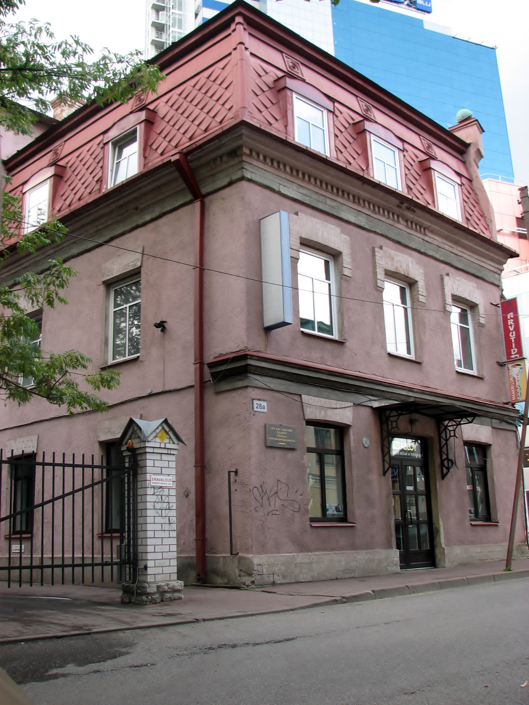 E.Lenderi Gümnaasiumi tänavapoolne hoone, 20. saj. algus